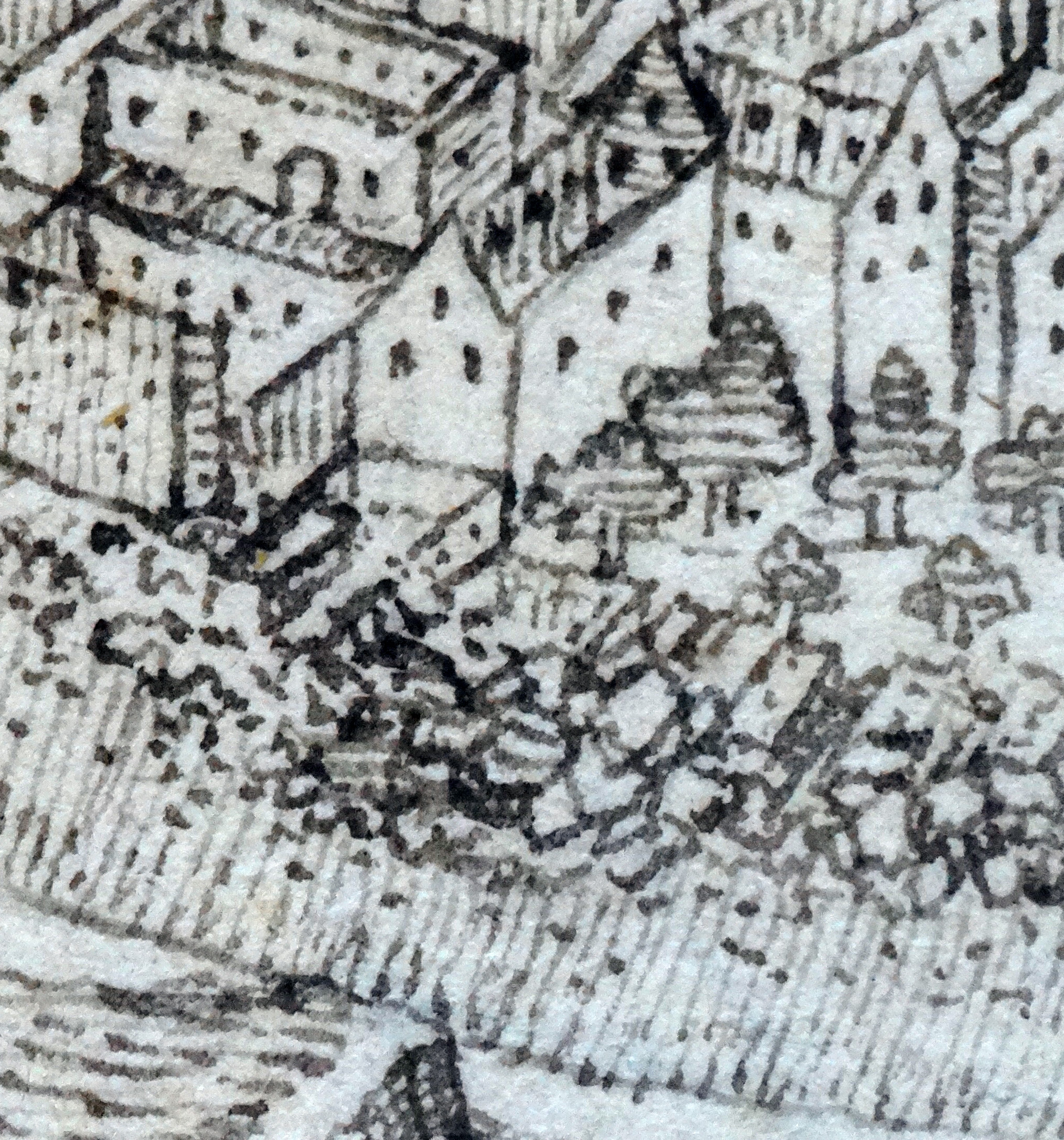 Christoffelturm nach der Zerstörung 1689. Detail aus: Peter Hamman: Ansicht der Stadt Worms nach der Zerstörung 1689 von Süden. Stadtarchiv Worms, Abt. 1B, Nr. 48.